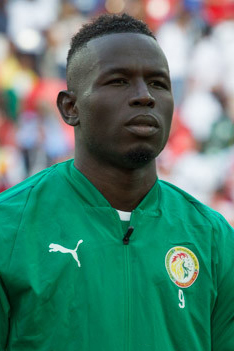 Польша неожиданно проиграла Сенегалу